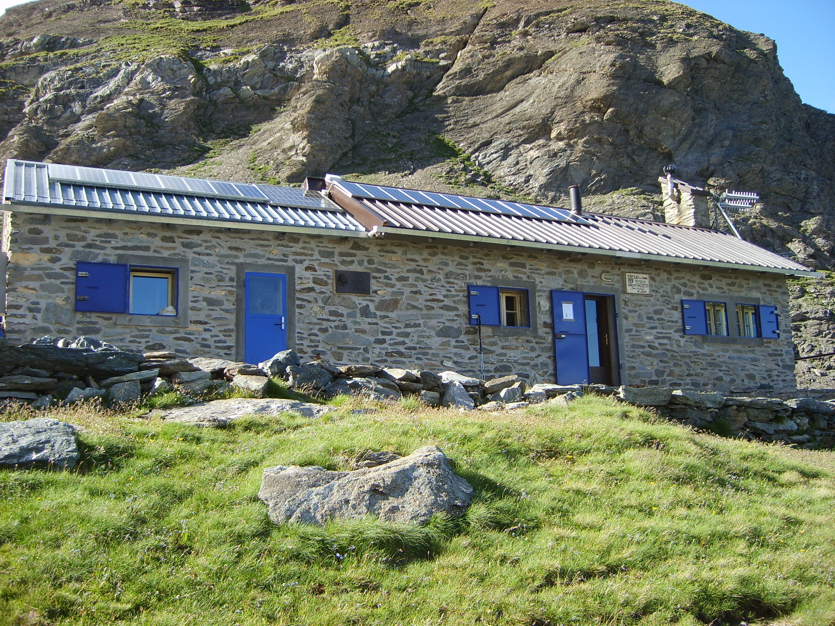 Fotografia del rifugio Ernesto Tazzetti (Usseglio)